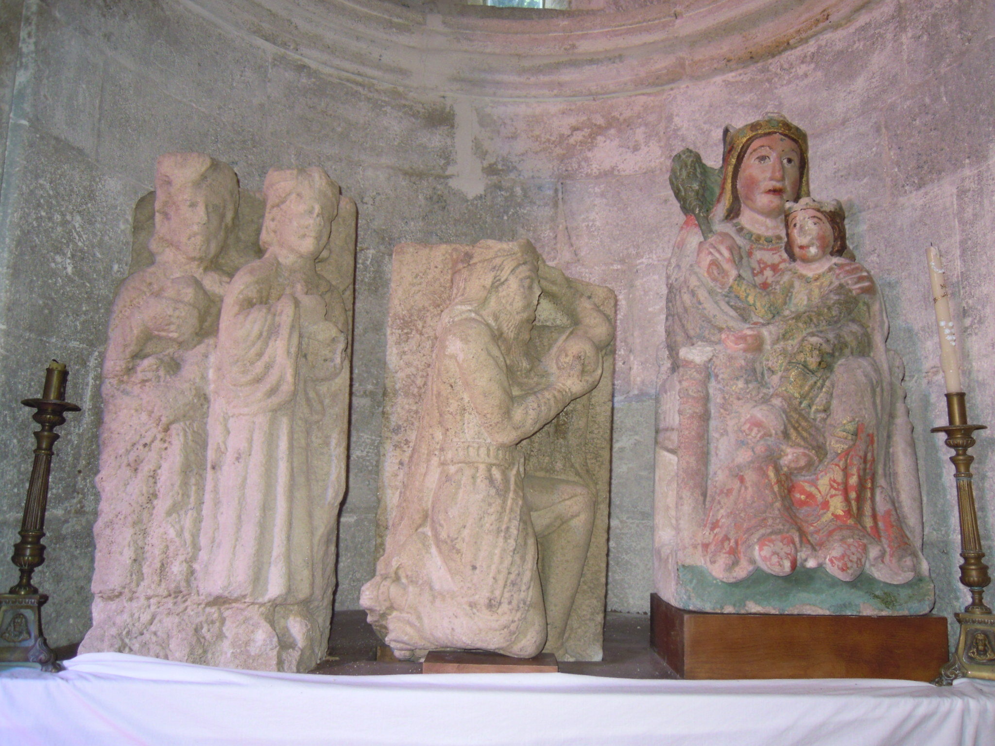 Epifanía en pedra na Igrexa de Santo Estevo de Ribas de Miño.